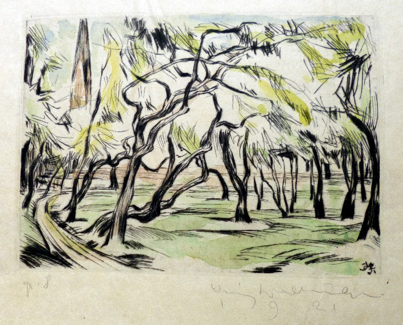 Grafik